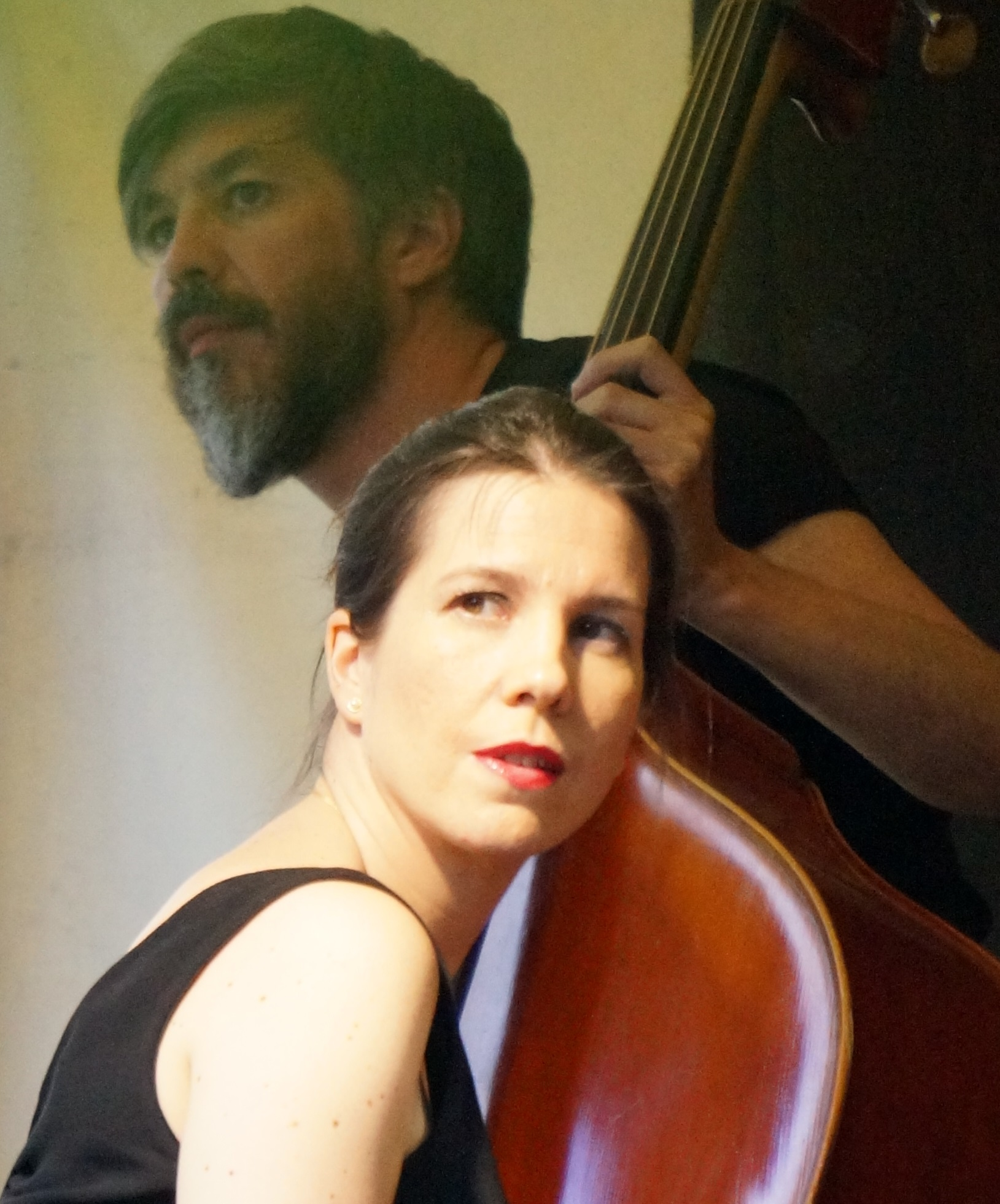 Violaine Cochard lors des Flâneries musicales 2014 avec la formation Troccatram.